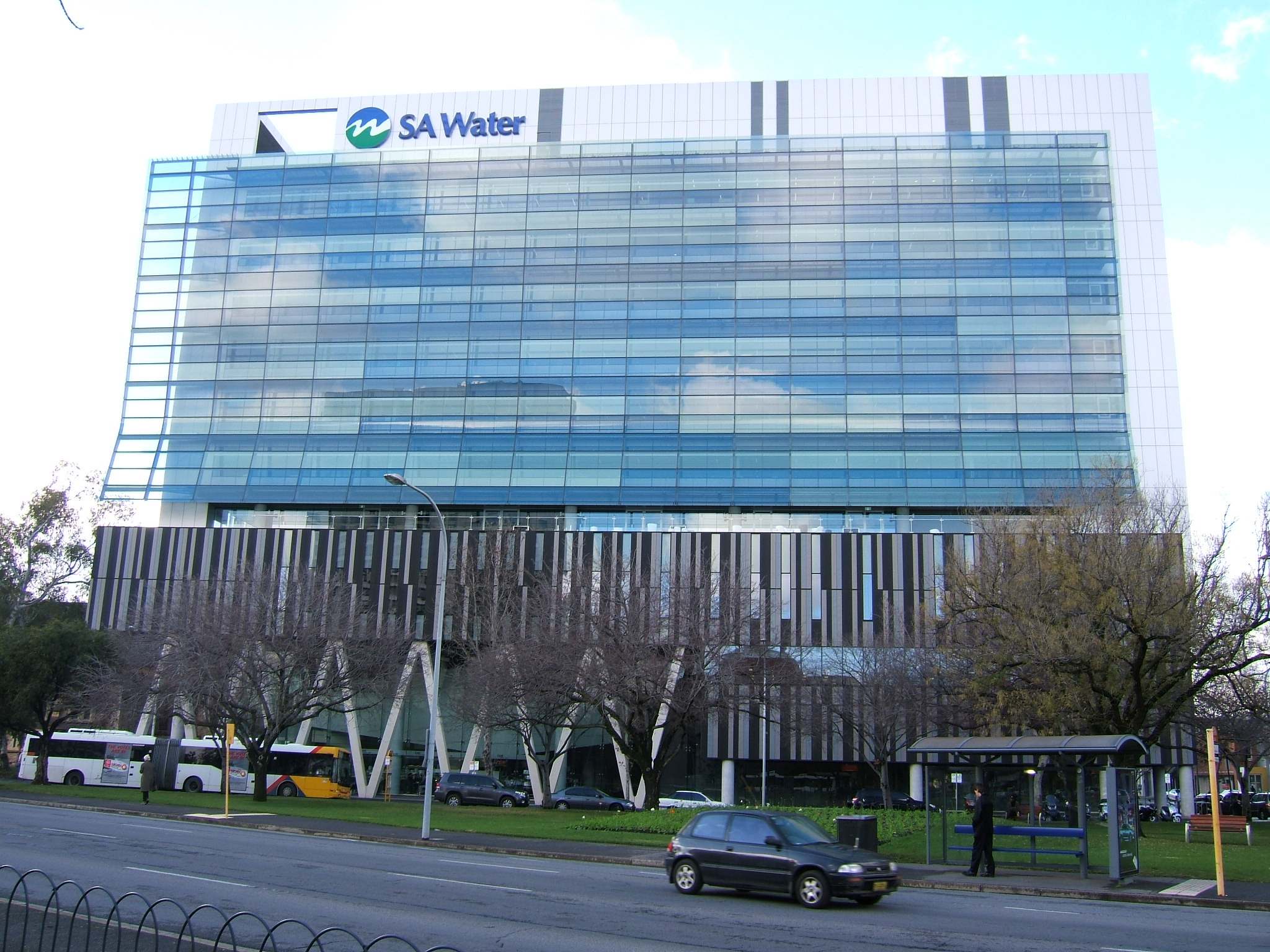 SA Water HQ, Adelaide